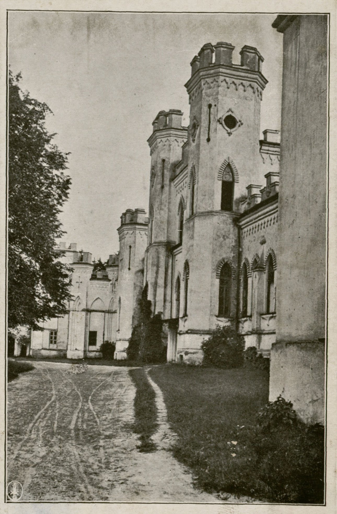 Беларуская (тарашкевіца): Косаў (Kosaŭ), сядзіба Пуслоўскіх (Pusłoŭski)